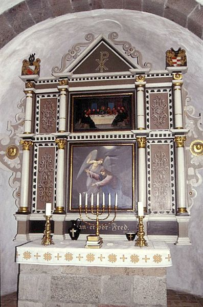 Vindum Kirke, Viborg Kommune, altertavle